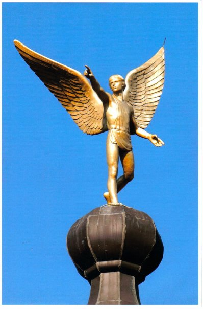 el ángel que corona la Iglesia de Almenar